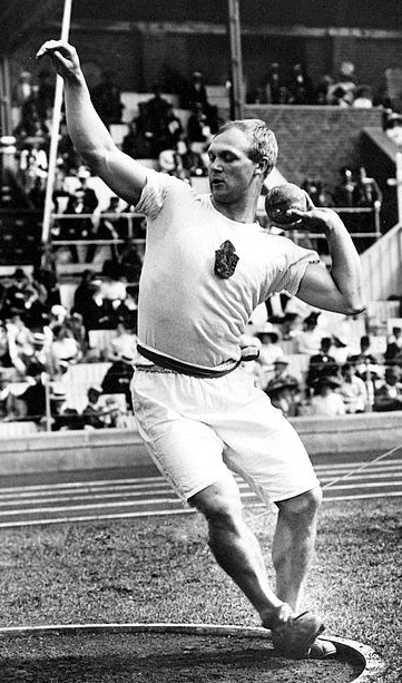 Elmer Niklander Tukholman olympialaisissa 1912.